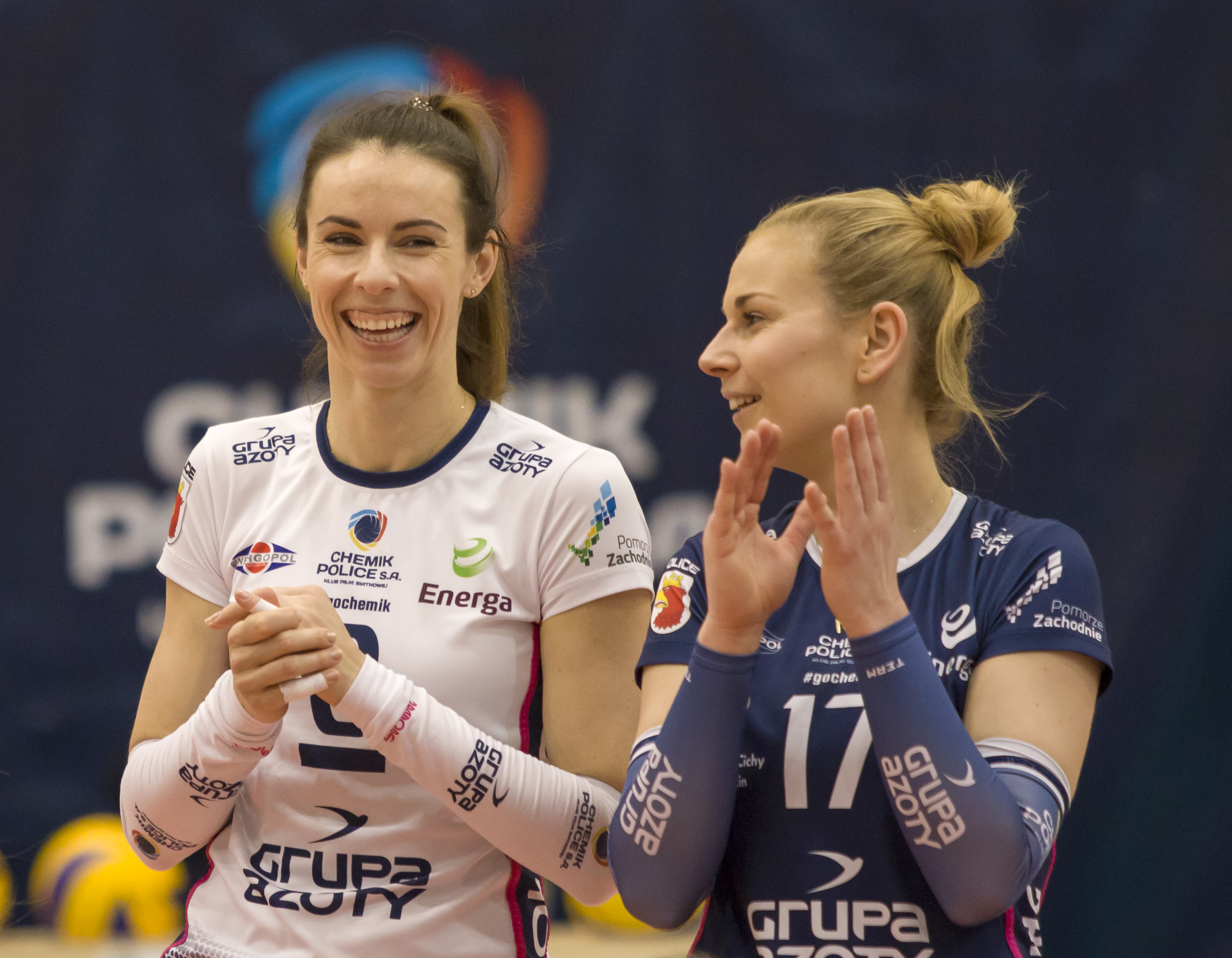 Kapitan Chemika Police - Izabela Bełcik oraz libero - Aleksandra Krzos (fot. Kacper Kolenda)